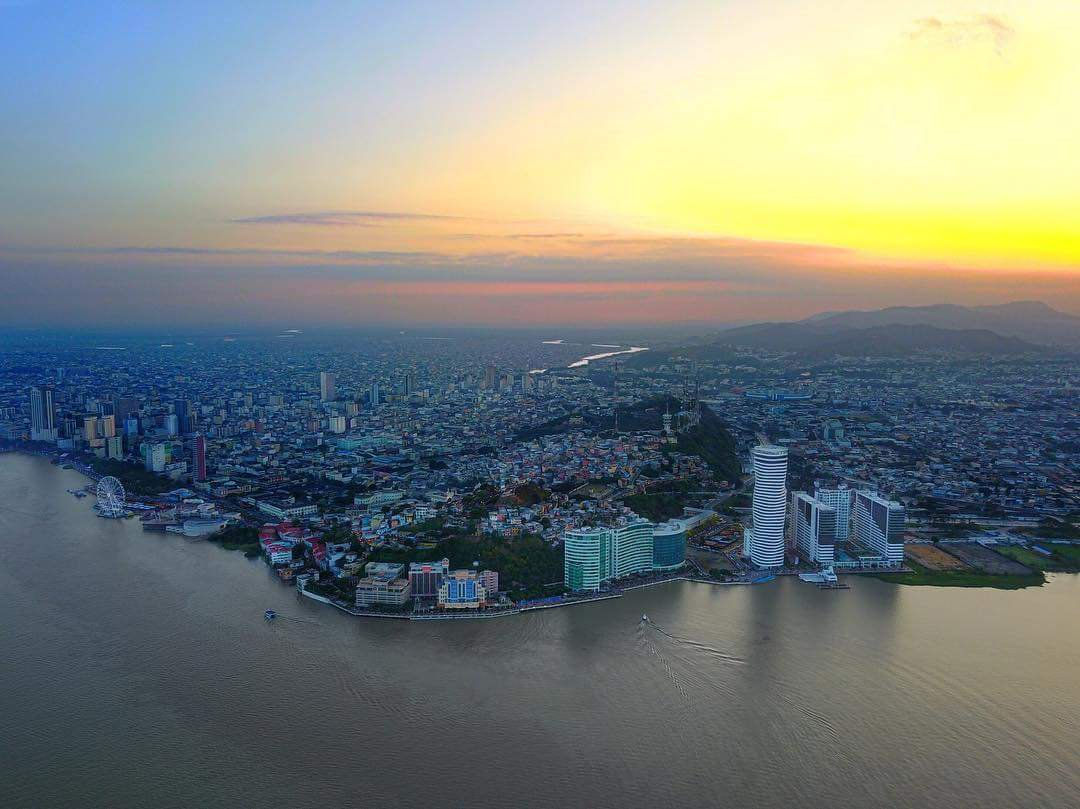 Aerial view of Guayaquil Ecuador